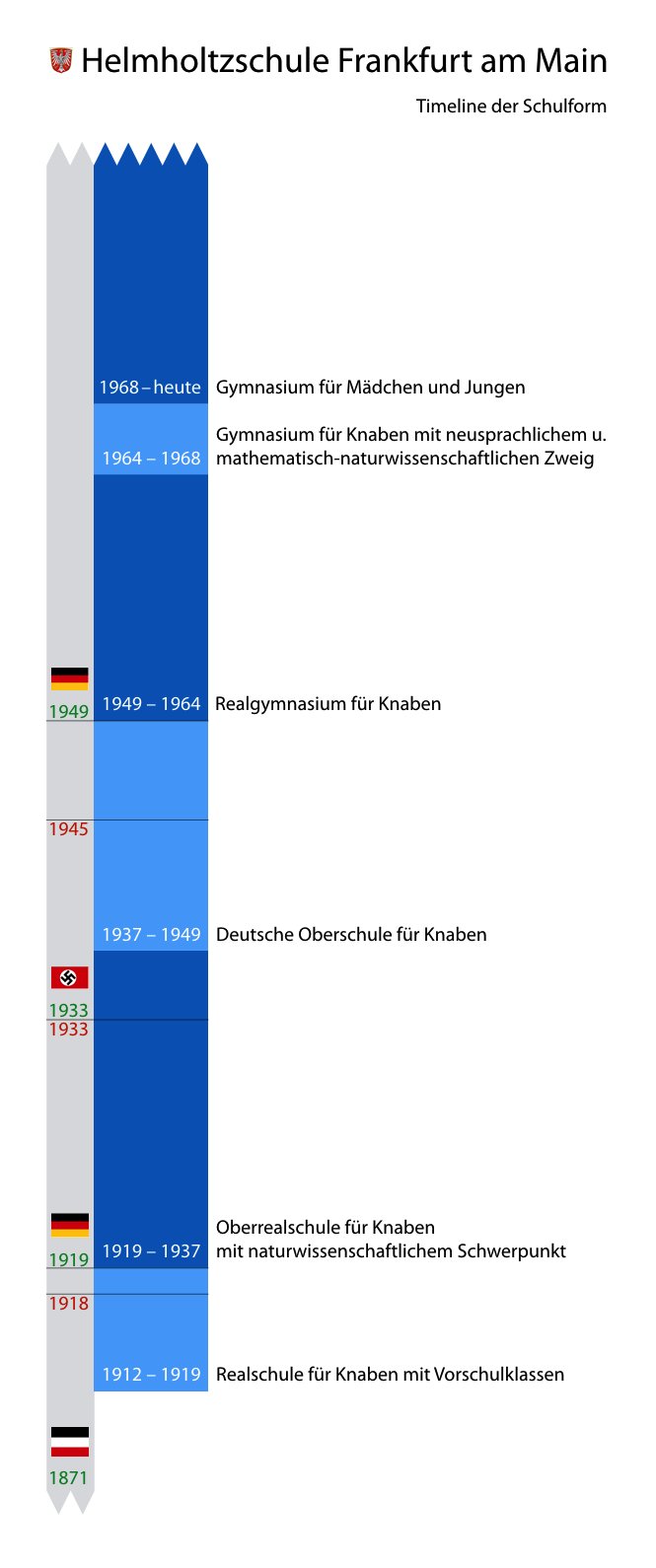 Timeline der unterschiedlichen Schulformen der Helmholtzschule in Frankfurt am Main von der Schulgründung 1912 bis heute – in Relation zu den wesentlichen historischen Daten und Staatsformen.